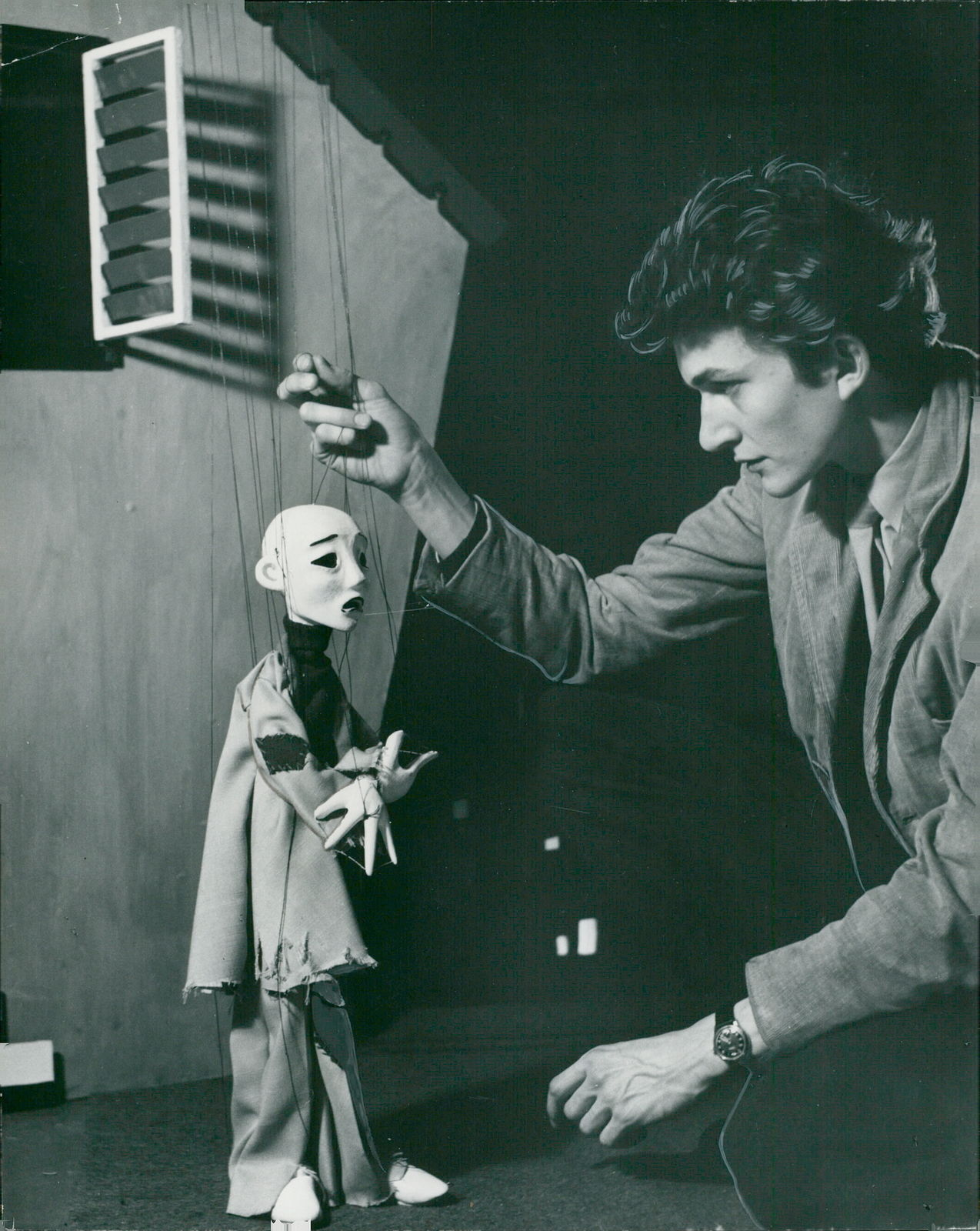 Fotografi av Michael Meschke, infört i Svenska Dagbladet 1953-04-27 s. 11.